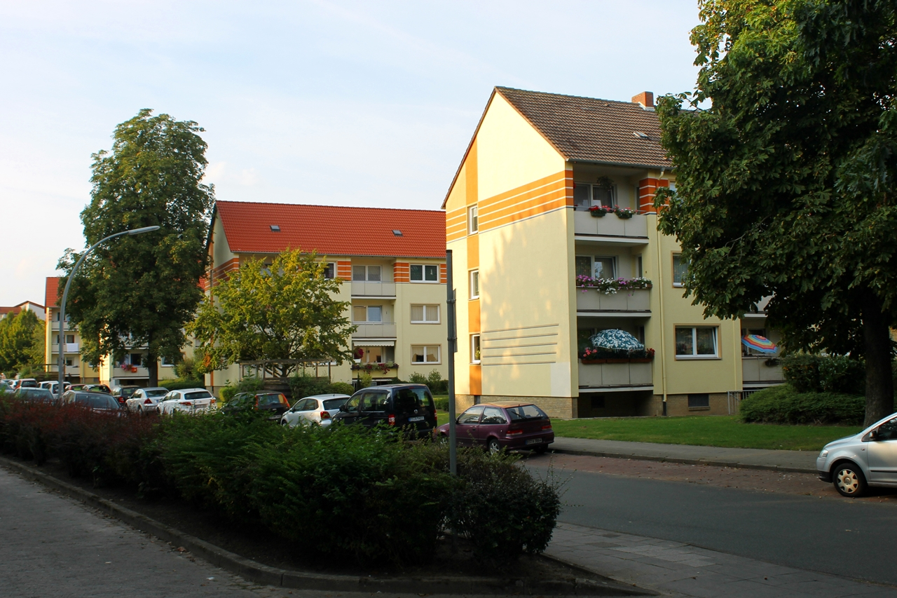 Wohnhäuser aus den 1960er Jahren (Erste Bauphase) im Donauviertel in der Braunschweiger Weststadt.